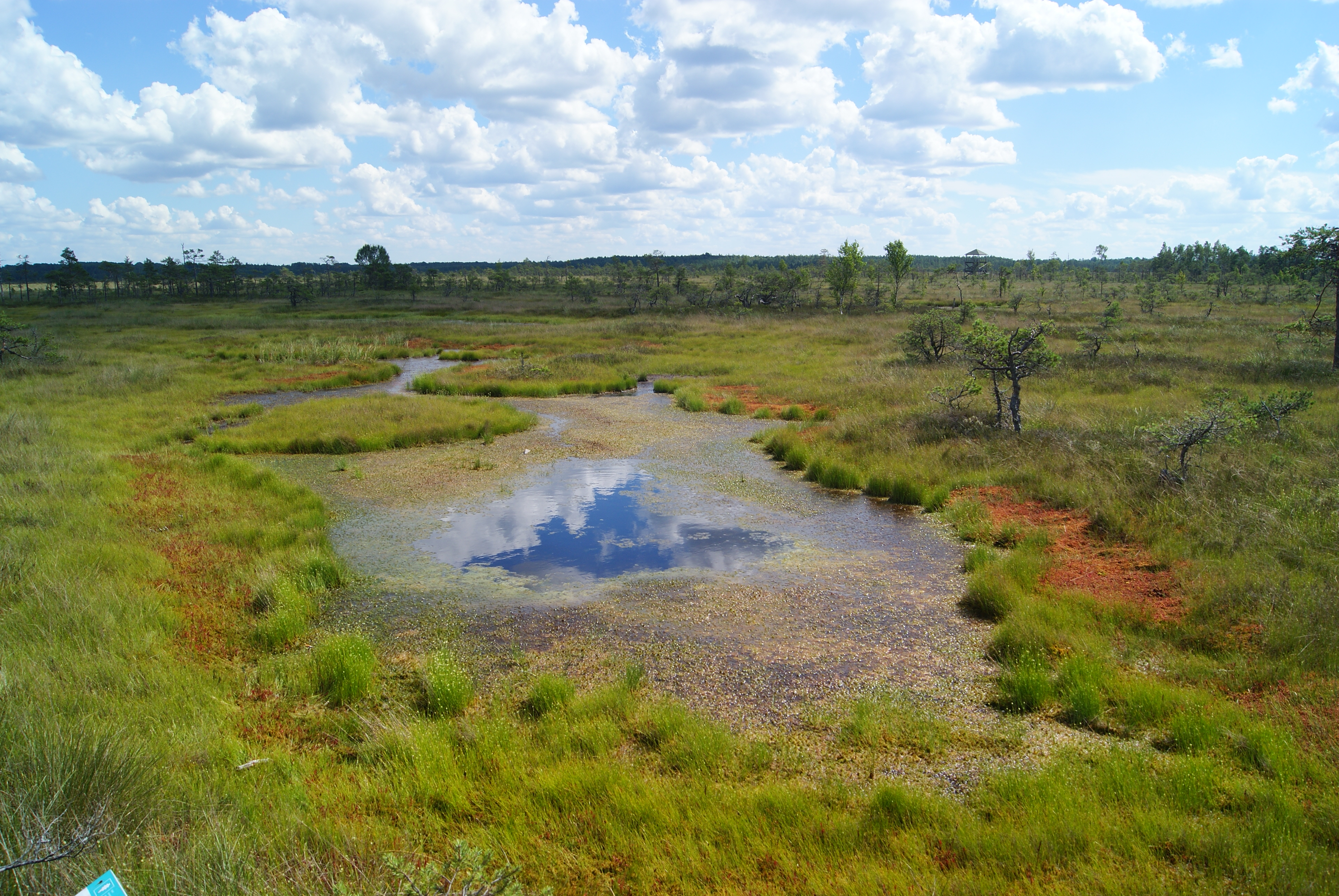 Vasenieku purvs